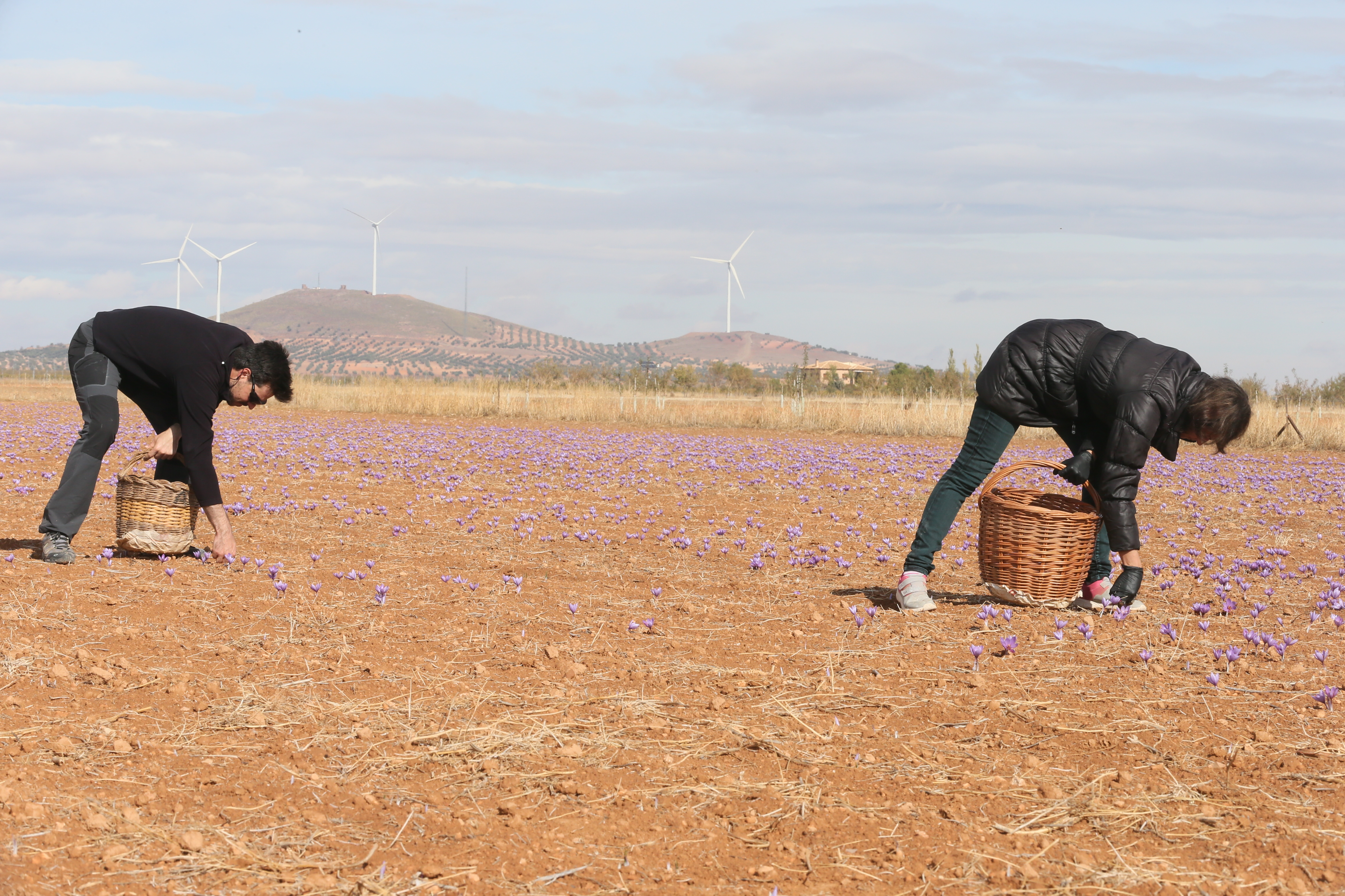 MADRIDEJOS (Toledo), 3 de noviembre de 2017.- El consejero de Agricultura, Medio Ambiente y Desarrollo Rural, Francisco Martínez Arroyo, asiste, en la localidad de Madridejos, a la recogida de la rosa del azafrán en el campo. (Fotos: Ignacio López // JCCM)